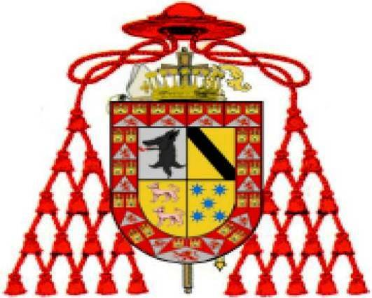 Escudo del Cardenal Baltasar Moscoso y Sandoval. Obispo de Jaén y Arzobispo de Toledo.